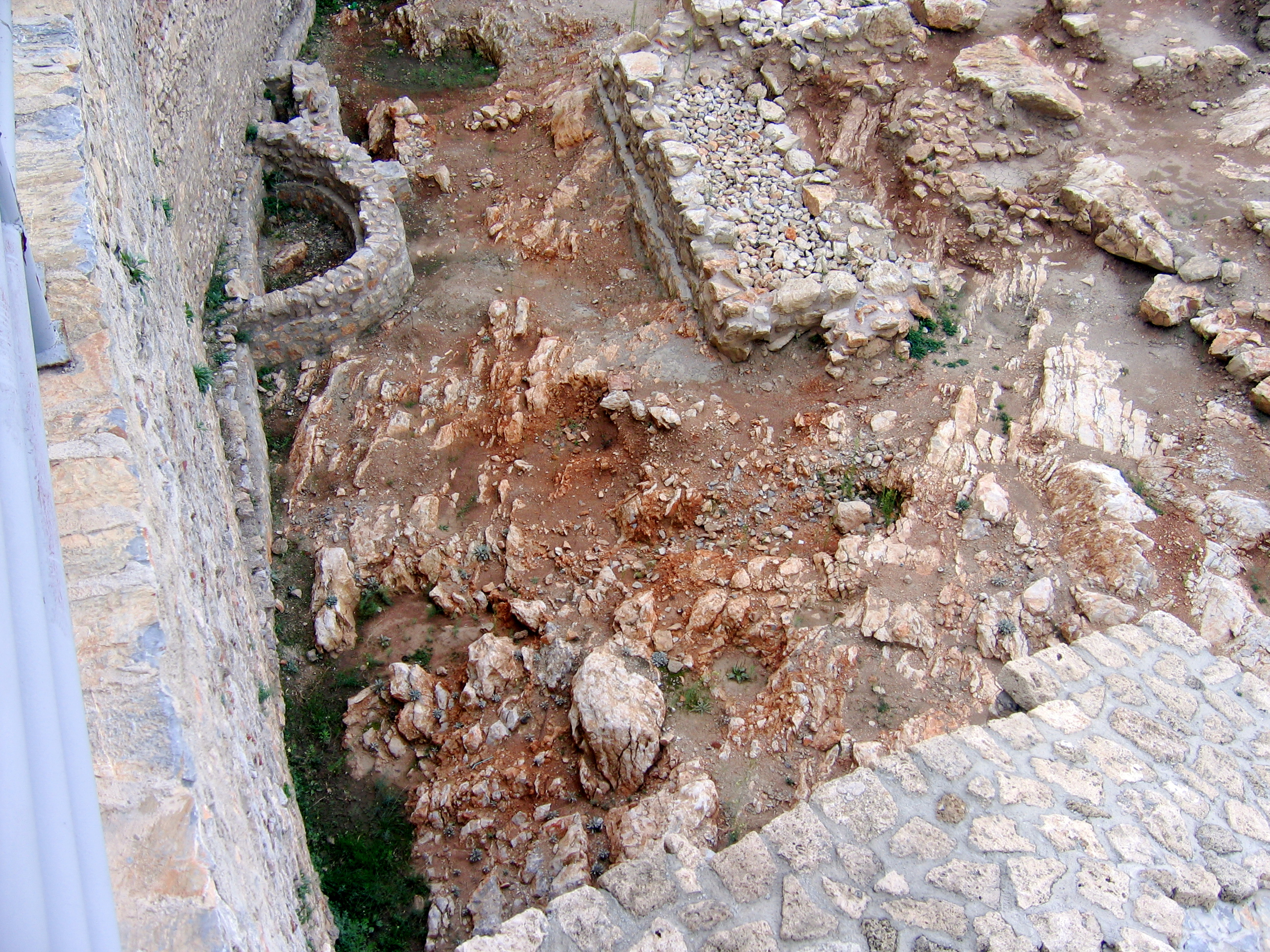 Охрид_2005_2667